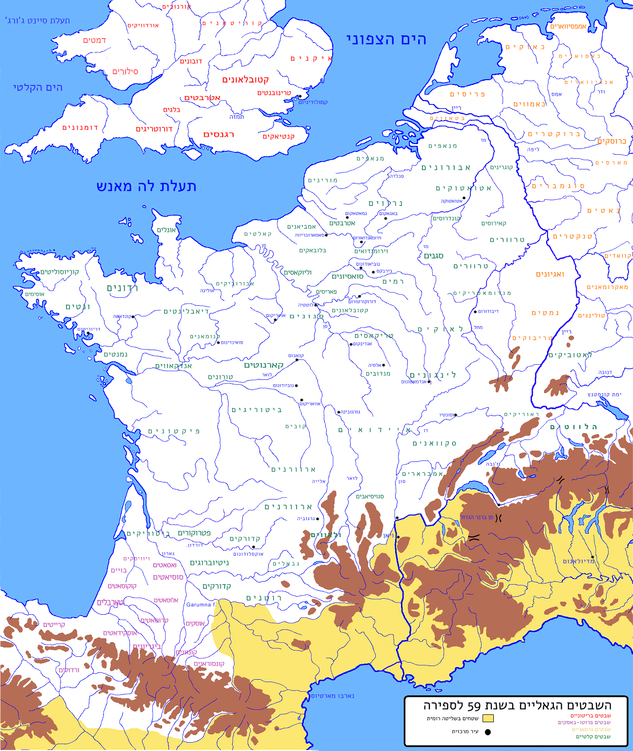 מפת השבטים הגאליים בשנת 59 לספירה